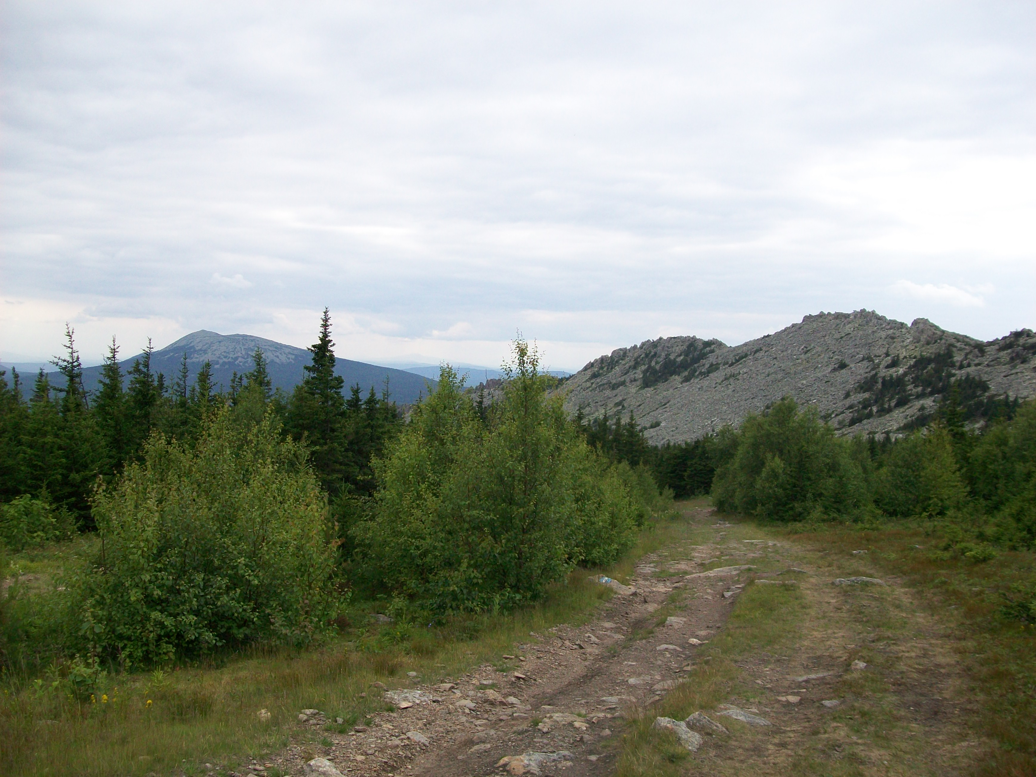 Гребень Дальнего Таганая с видом на соседнюю гору Круглицу